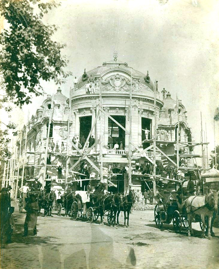 Снимка на новопостроената сграда на Варненския градски театър.